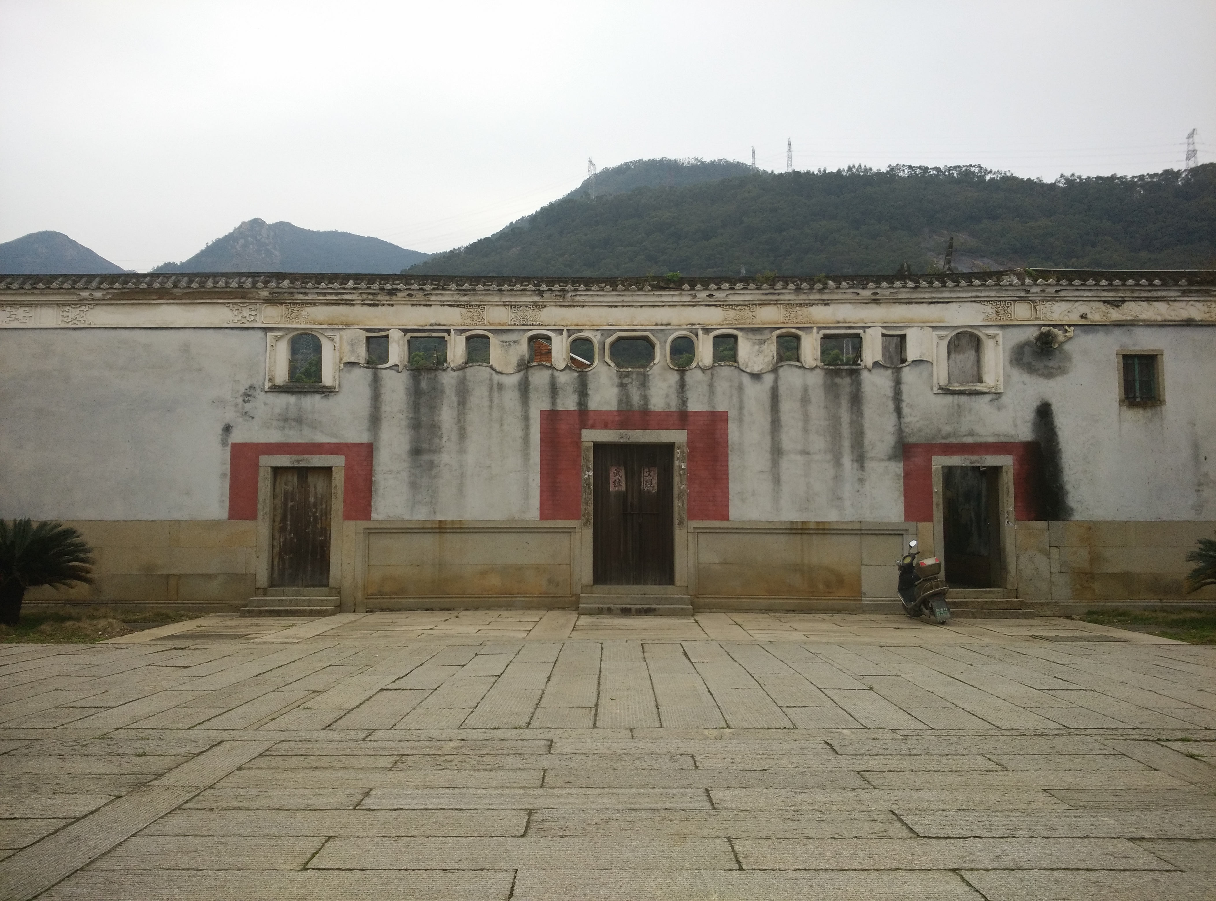 九头马民居正门